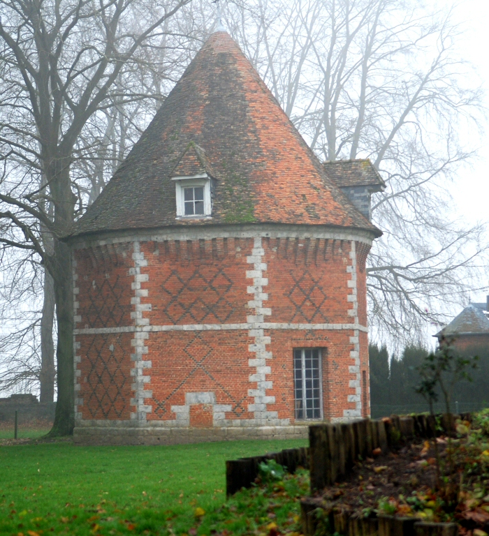 Domaine du Fossé : le Colombier